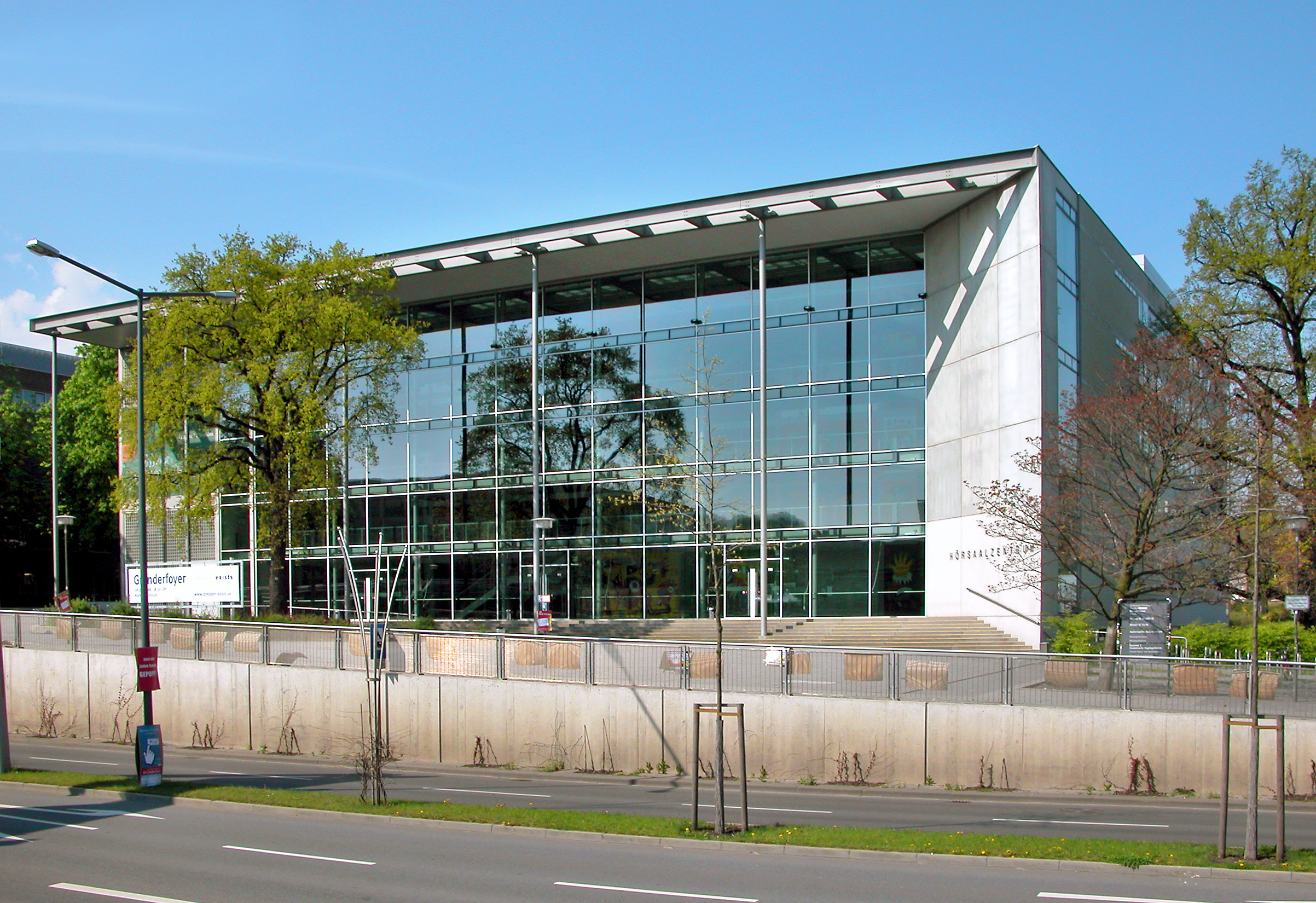 27.04.2008 01069 Dresden-Südvorstadt, Bergstraße 64 (GMP: 51.028798,13.730019) : Hörsaalzentrum der TU Dresden. Architekten Klein & Sänger zusammen mit Dömges + Partner. 1998 fertiggestellt. Sicht von Osten. [DSCN32392.TIF]20080427010DR.JPG(c)Blobelt